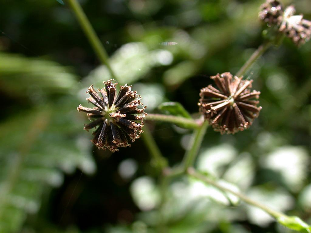 Adenostemma lavenia：ヌマダイコン 2006/10/15 和歌山県田辺市：Tanabe City. Wakayama pref. Japan